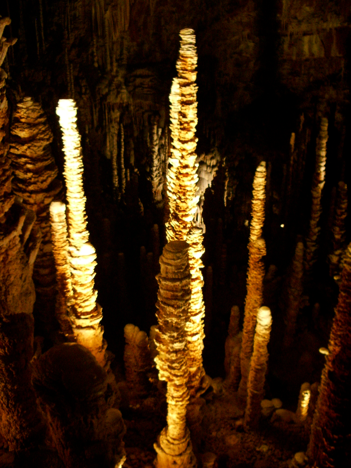 Stalagmites constituées principalement de calcite blanche dans la grotte appelée l'aven Armand (Hures-la-Parade - Lozère).